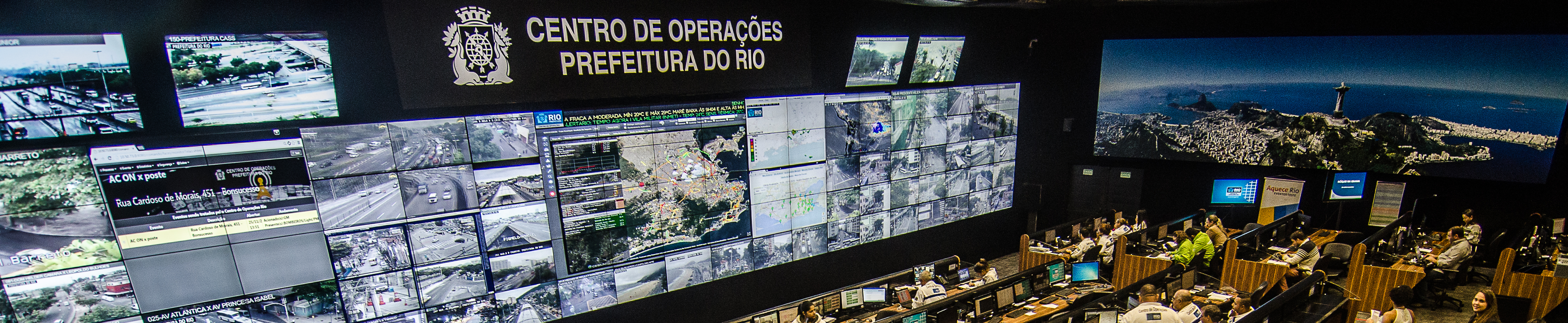 Sala de controle do COR funciona 24h por dia, 7 dias na semana. Reúne mais de 30 órgãos da Prefeitura do Rio.